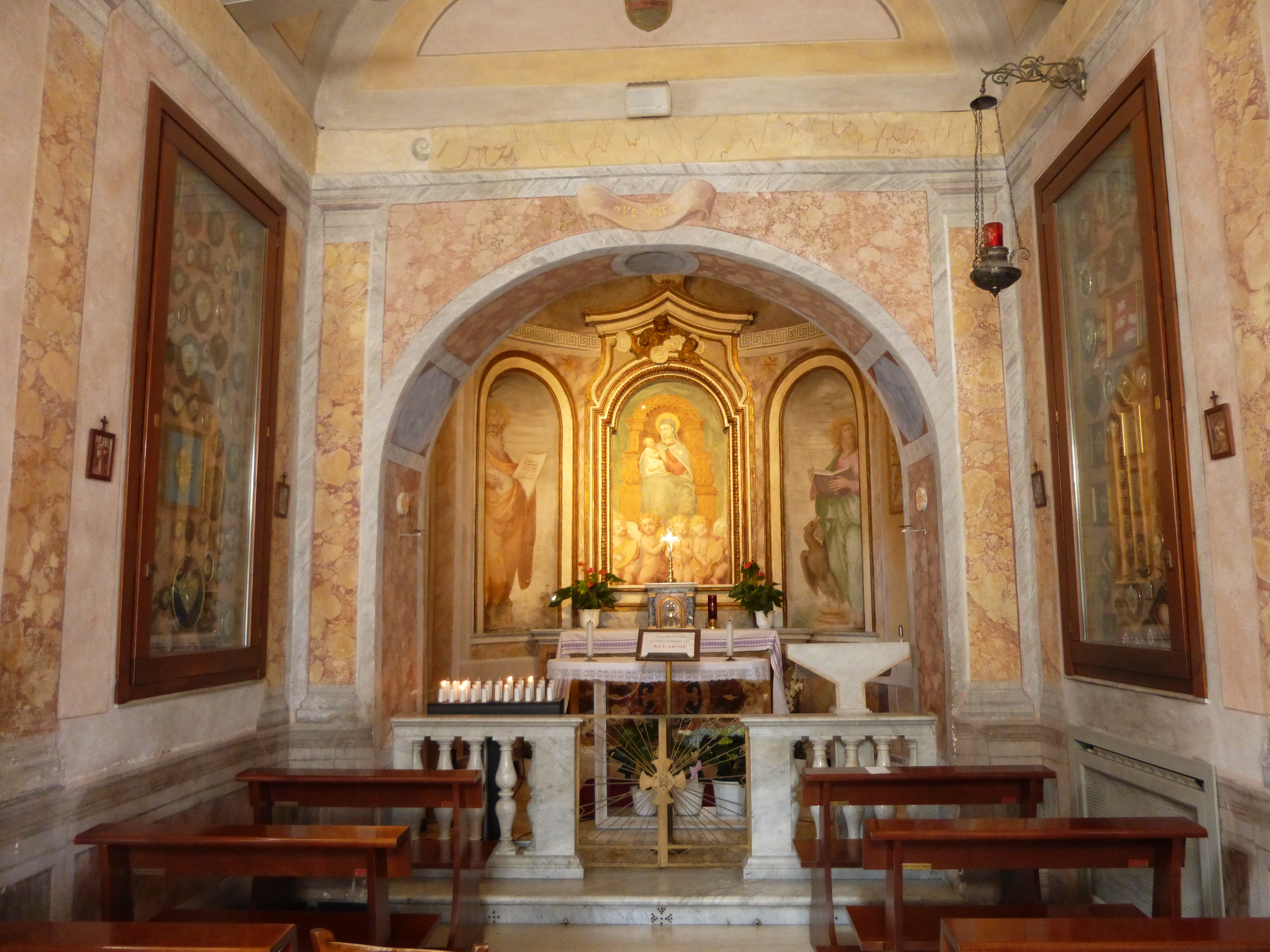 Roma, Madonna del Riposo a via Aurelia. Interno. A destra e a sinistra le bacheche di ex voto.